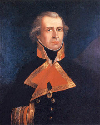 Retrato del marino español Dionisio Alcalá Galiano (1760-1805), que llegó a ser brigadier de la Real Armada Española y murió en la batalla de Trafalgar, el día 21 de octubre de 1805. El retratado aparece de medio cuerpo y de frente y con la cruz de caballero de la Orden de Alcántara bordada en el pecho.